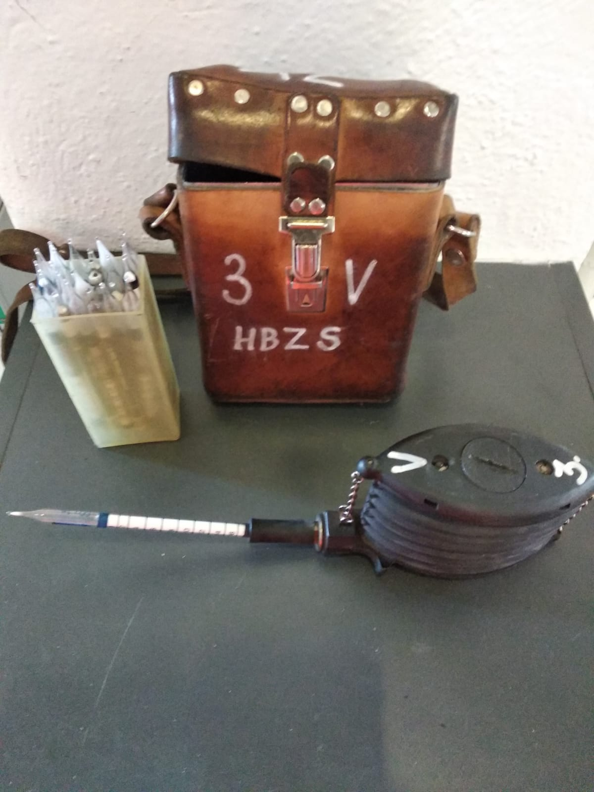 Souprava